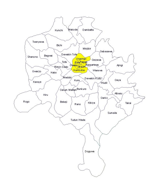 las LGA's que conforman la cioudad de Kano, Nigeria.